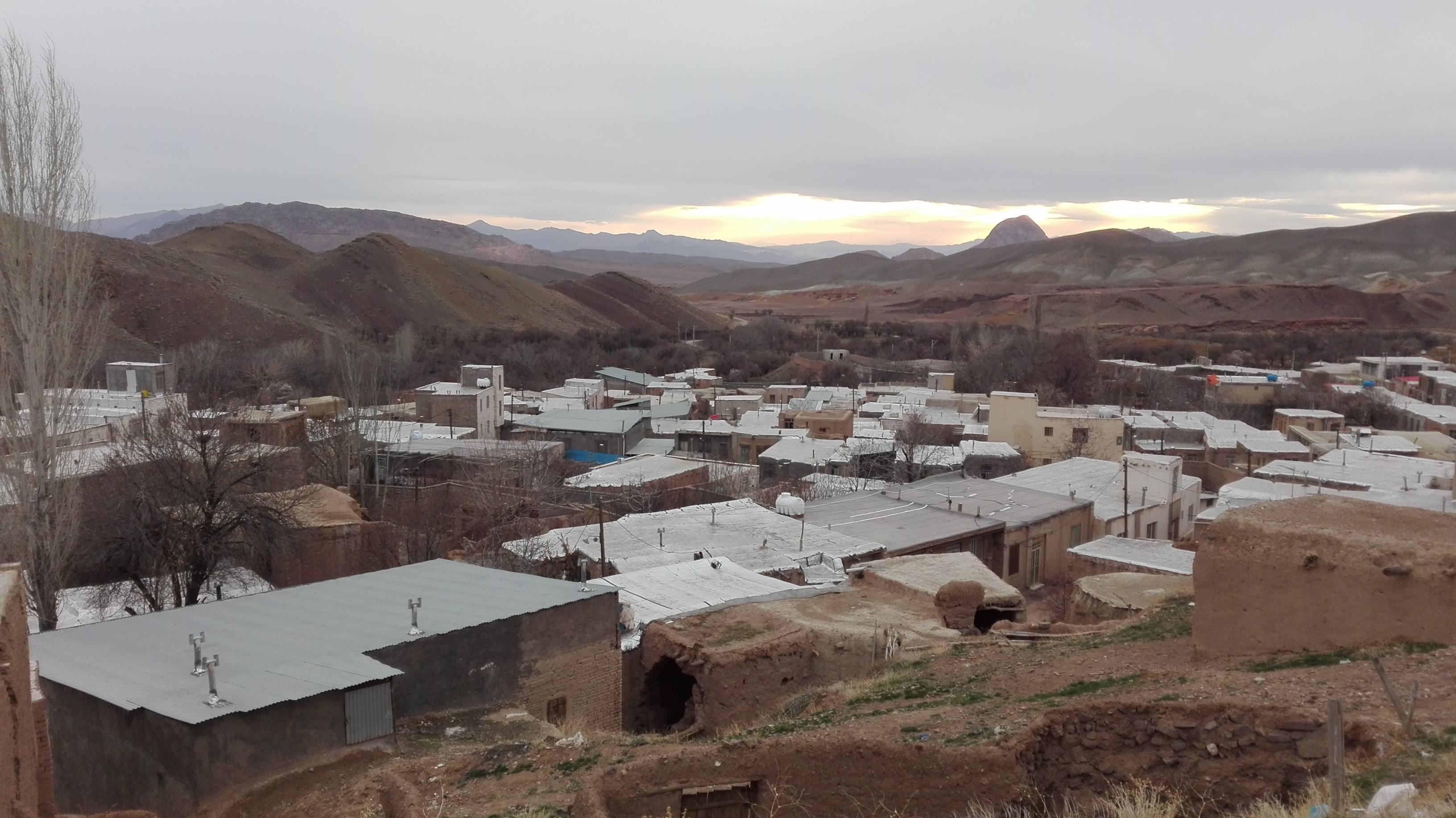 روستای سینقان نمای هوایی